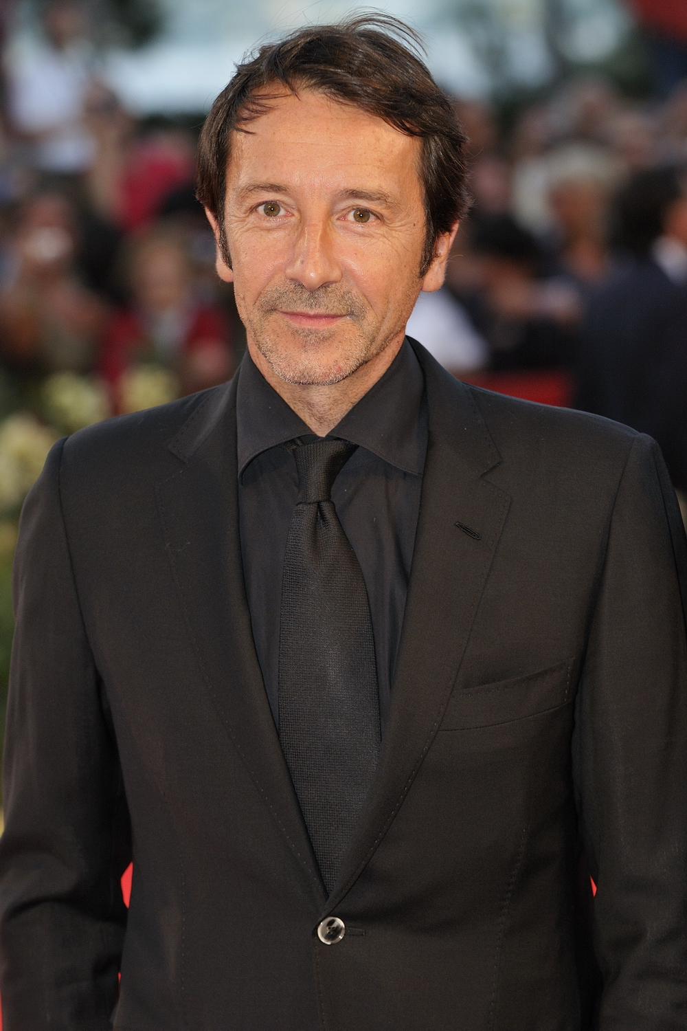 66ème Festival du Cinéma de Venise (Mostra), 4ème jour (05/09/2009) Tapis Rouge avec Jean-Hugues Anglade pour le film : Persécution